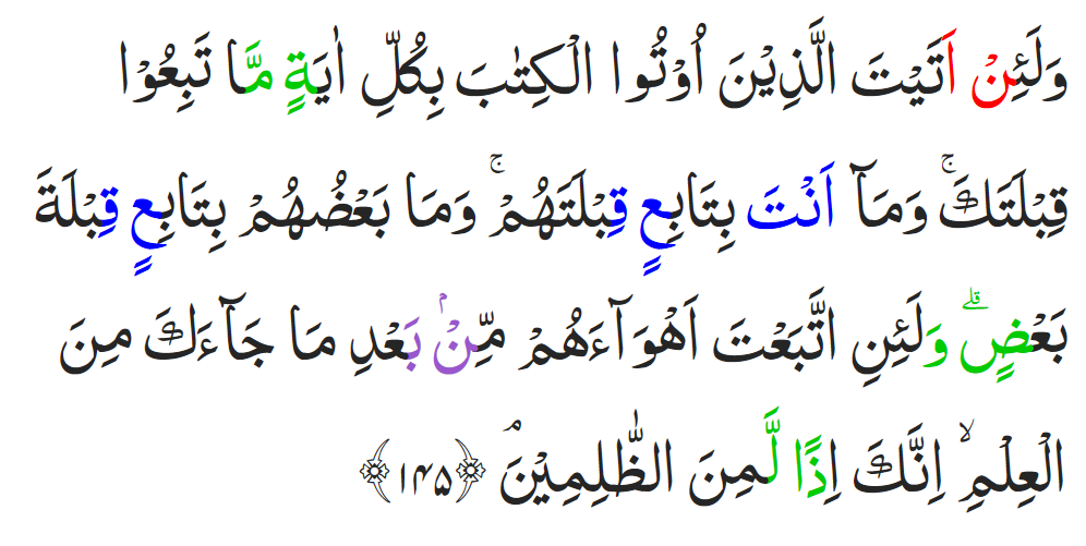 Al-Quran surah Potongan ayat Surah Al-Baqarah ayat 145. Keterangan tajwid: Izhar halqi, Idgham, Ikhfa Haqiqi, Iqlab